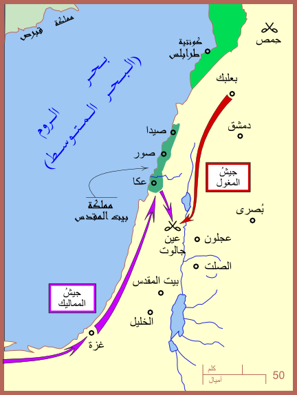 خارطة تُظهرُ مسير الجيشين المغولي والإسلامي المملوكي إلى عين جالوت، سنة 1260م.